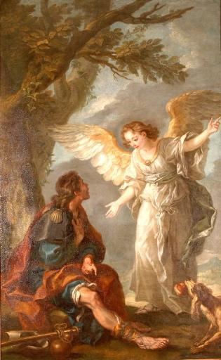 Saint Roch et l'ange